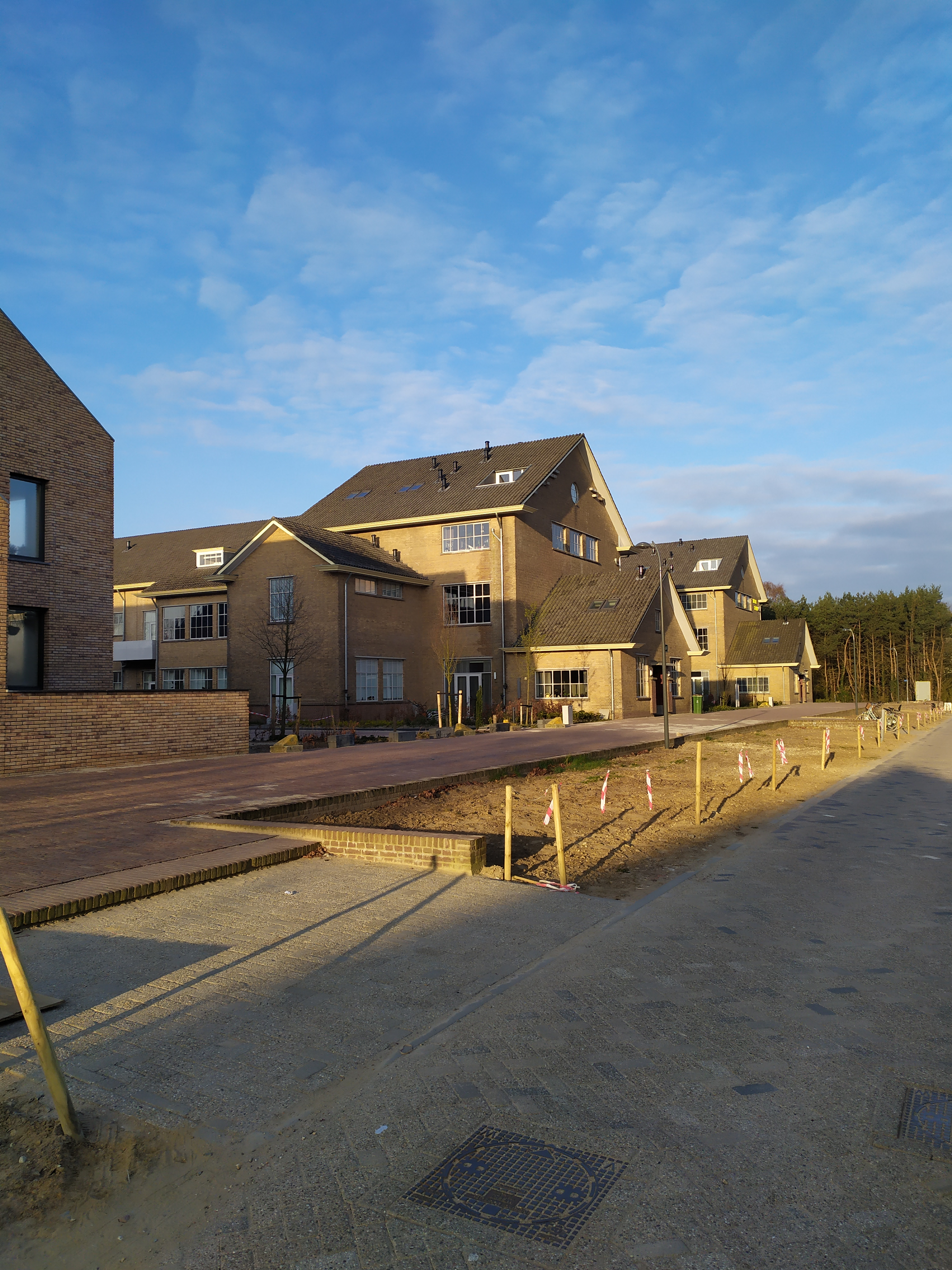 voormalige Simon Stevinkazerne Ede 2 april 2020